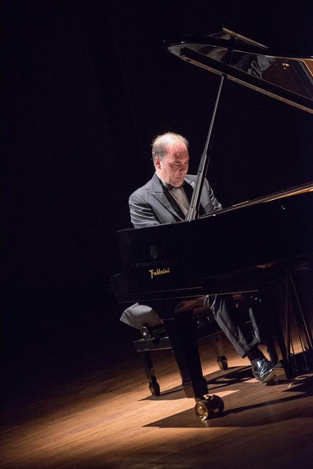 Piano concierto, Milano, 2015